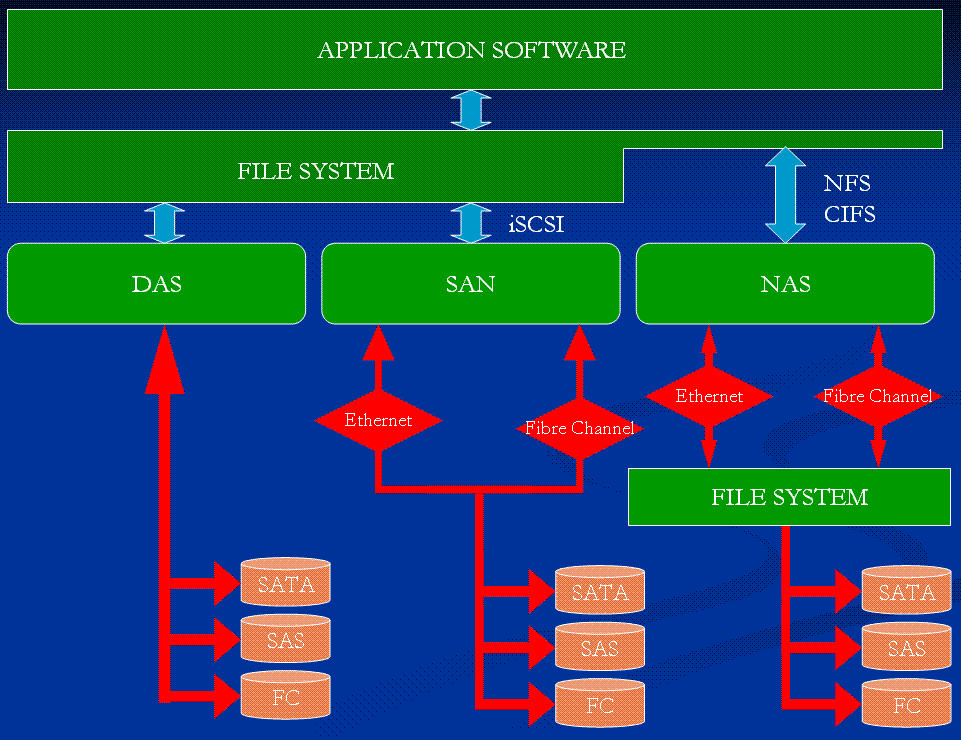 Comparative